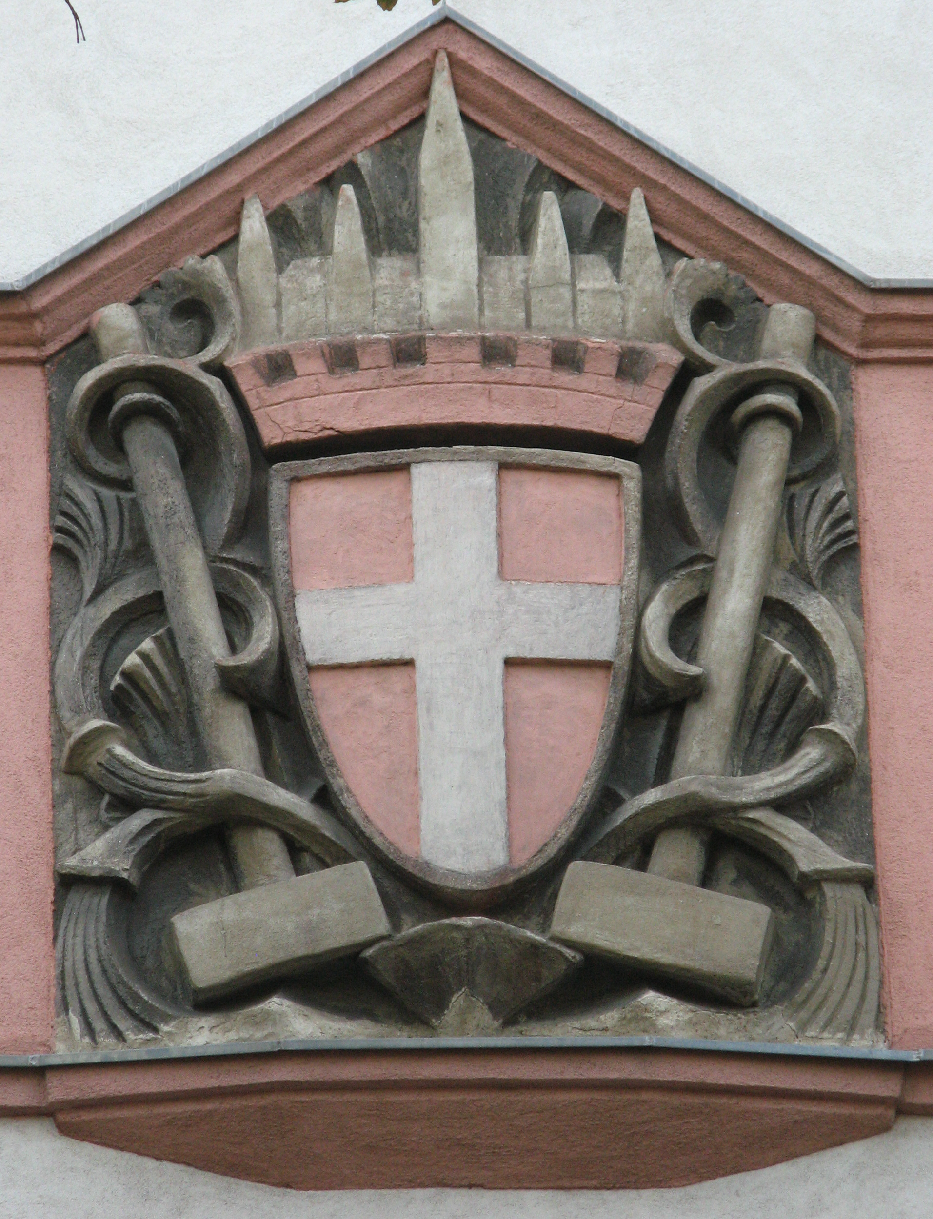 Wappen von Wien, Pölzerhof, Dampfgasse 35-37, Wien-Favoriten